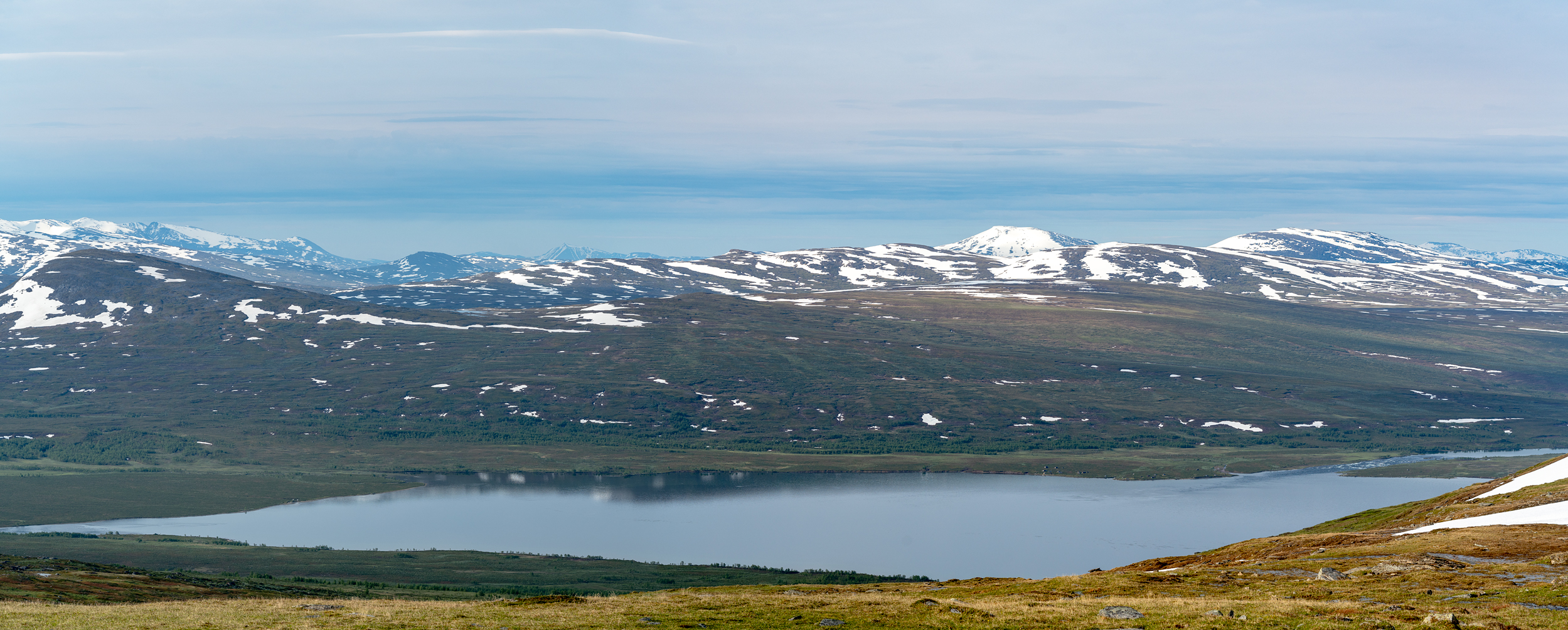 Vy mot Guvtjávrre från Muvrratjåhkkå.